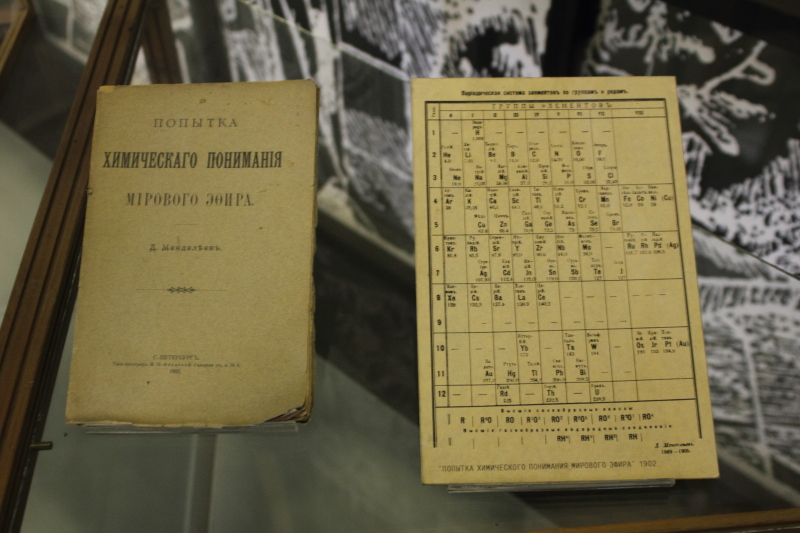 Обложка труда Д. Менделеева "Попытка химического понимания мирового эфира" и периодическая таблица элементов из нее. Находится в Политехническом музее в г. Москве